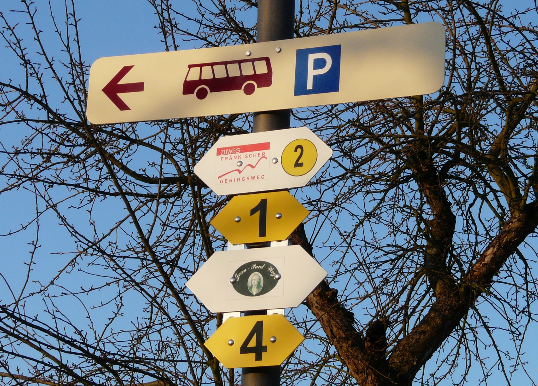 Wanderwegweiser in Goldkronach, Fränkischer Gebirgsweg, Jean-Paul-Weg